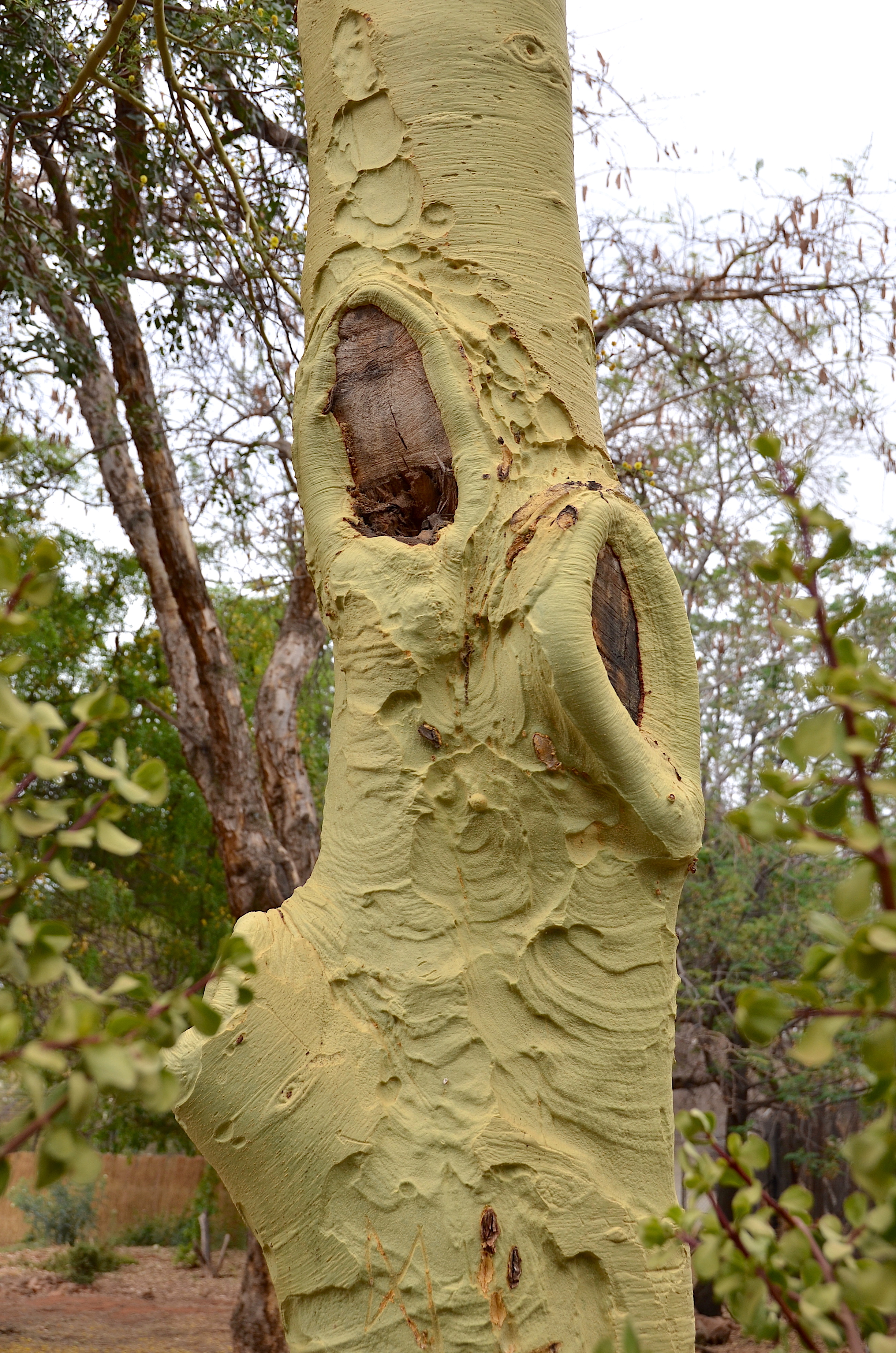 Stamm einer Gelbrinden-Akazie in Südafrika